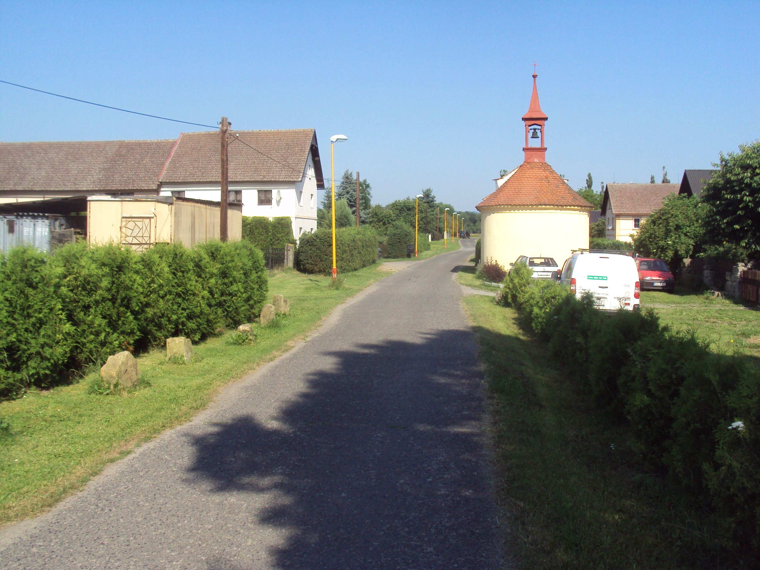 Kaple v Borku